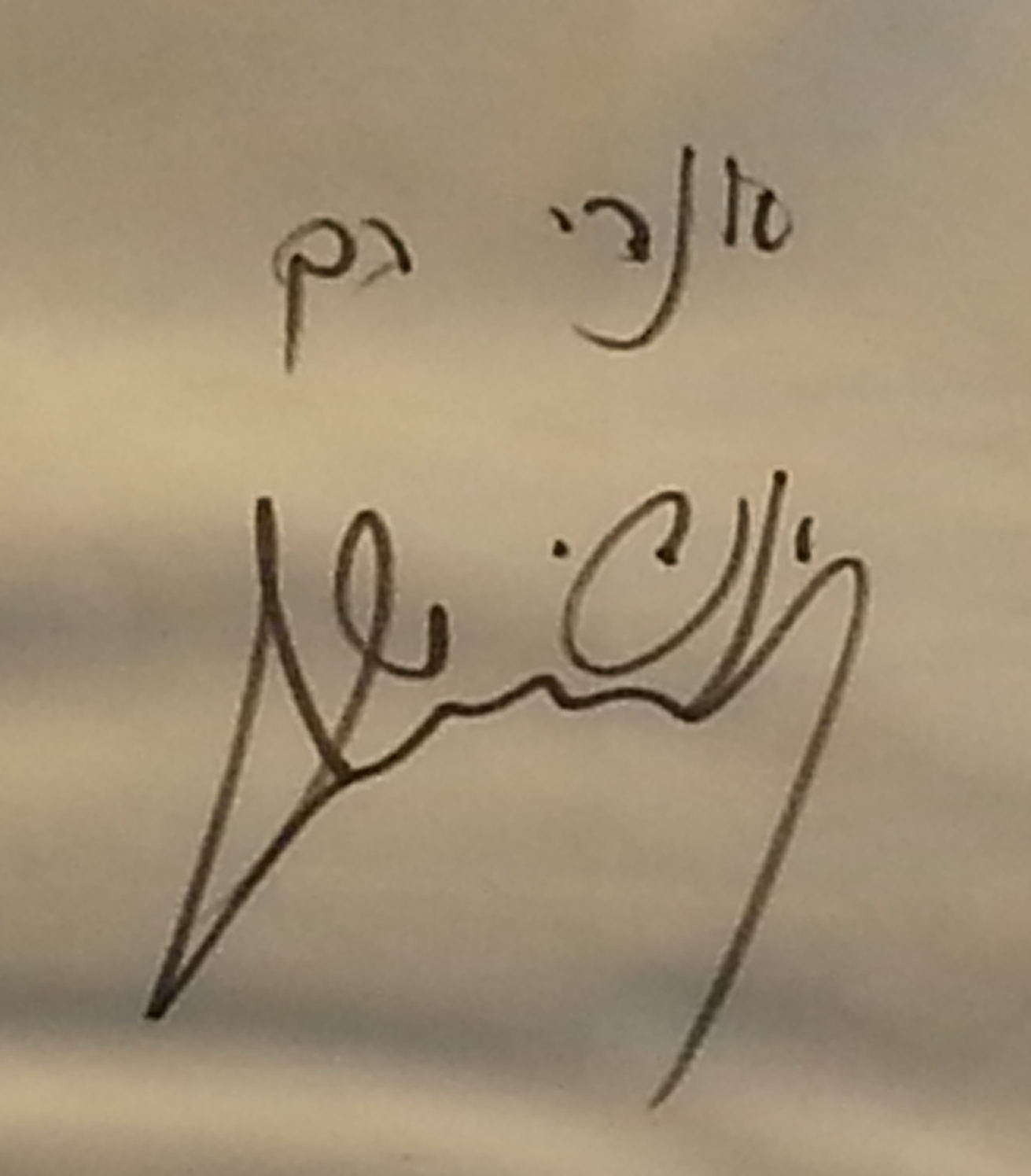 חתימה של הטניסאי אנדי רם